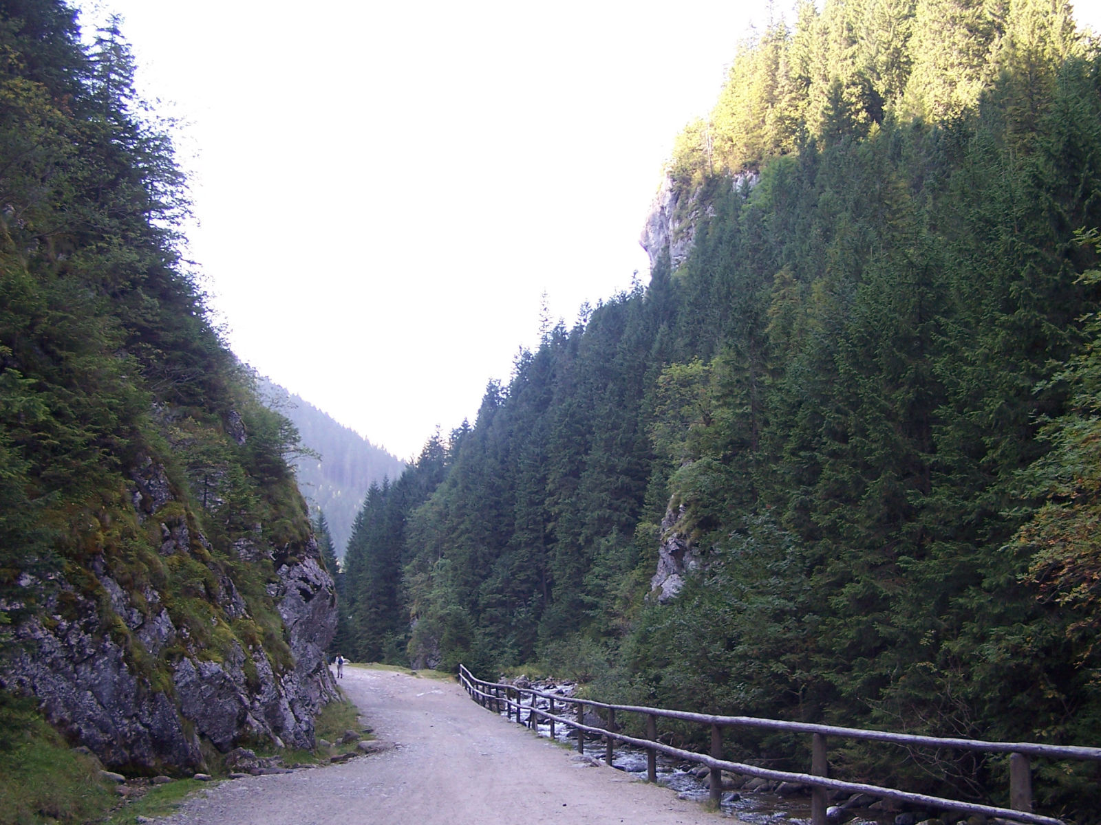 Wyżnia Brama Chochołowska (Tatry Zachodnie)